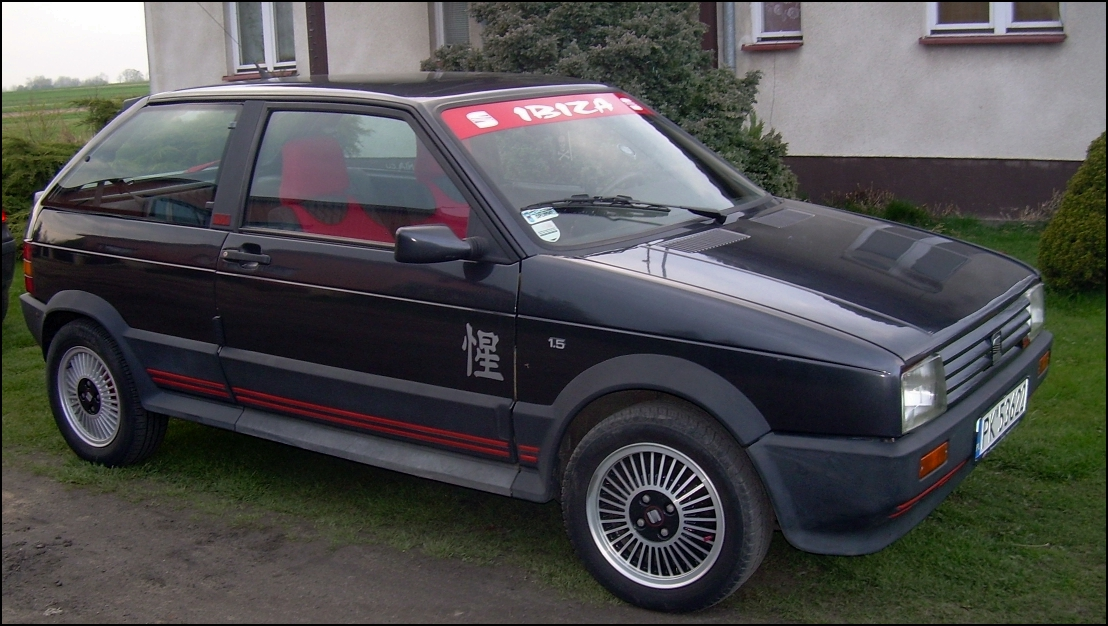 Seat Ibiza Sxi 1.5 1991r